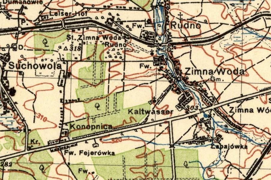 Карта Військового інституту географічного (Польща) дійсна на 1923 рік (мірила 1:100000)